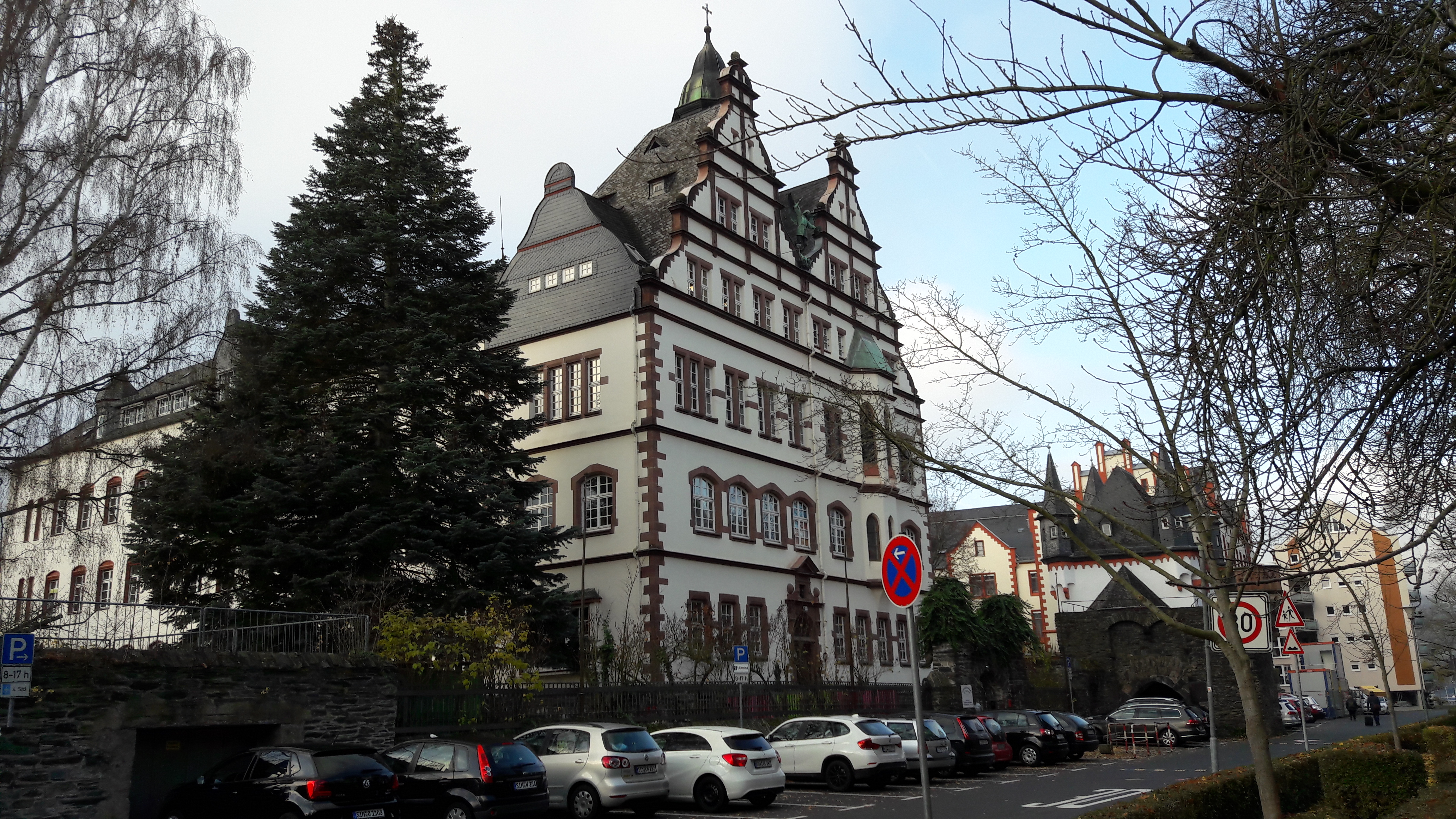 Haus in der Rheinallee 22, Boppard